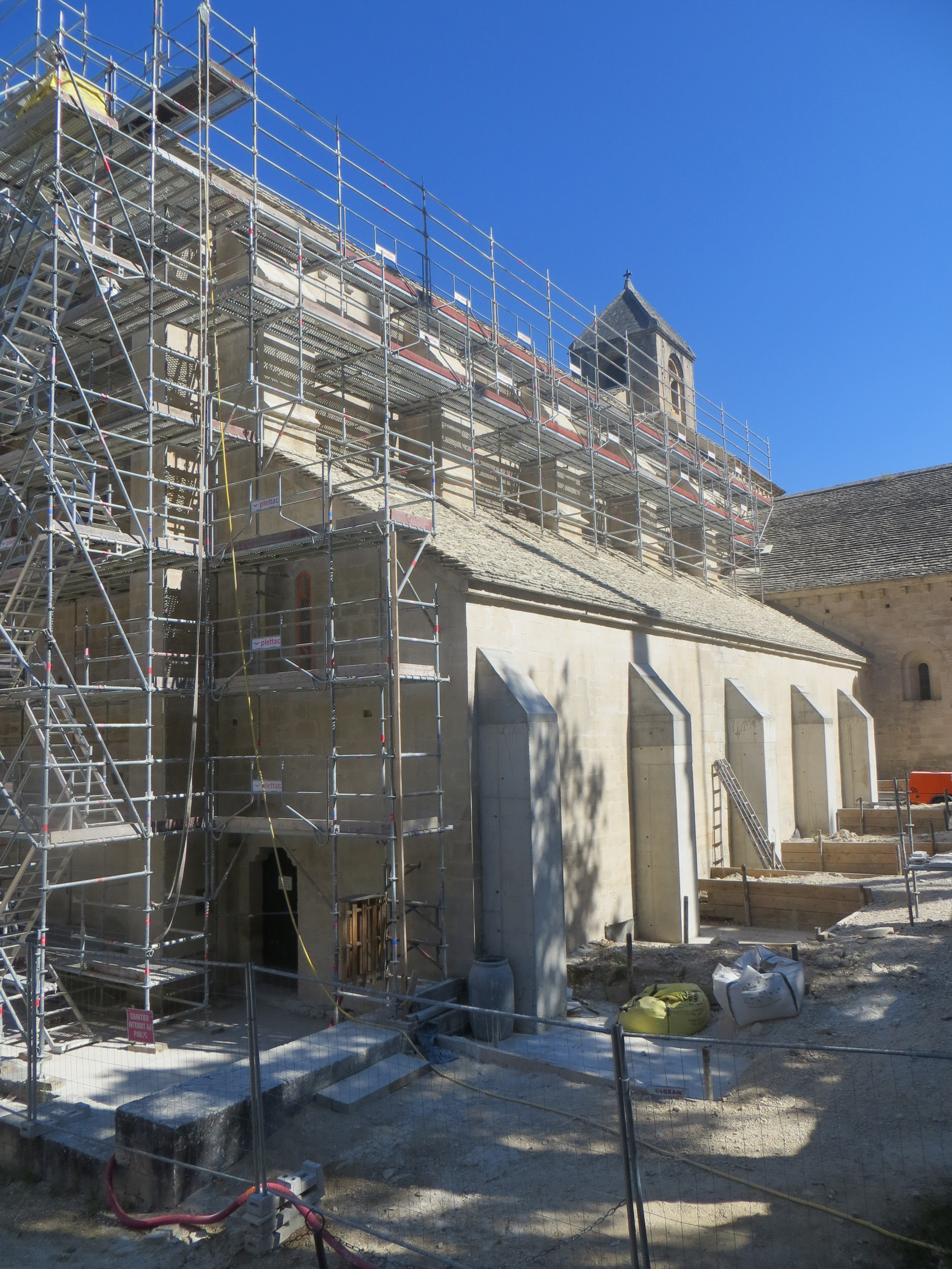 Chantier de réalisation de contreforts pour équilibrer la poussée des voûtes.